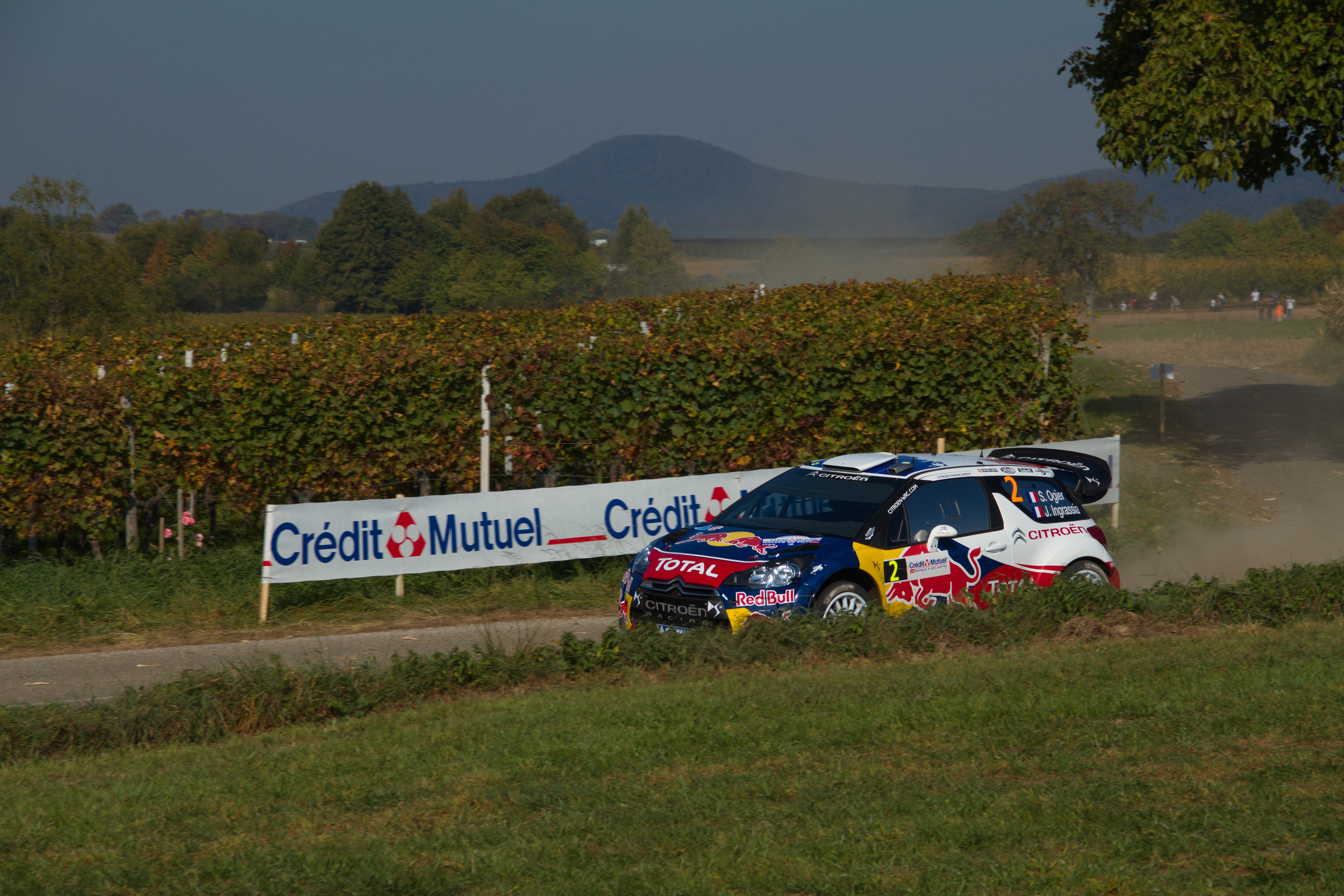 S. Ogiers, en tête du WRC Alsace